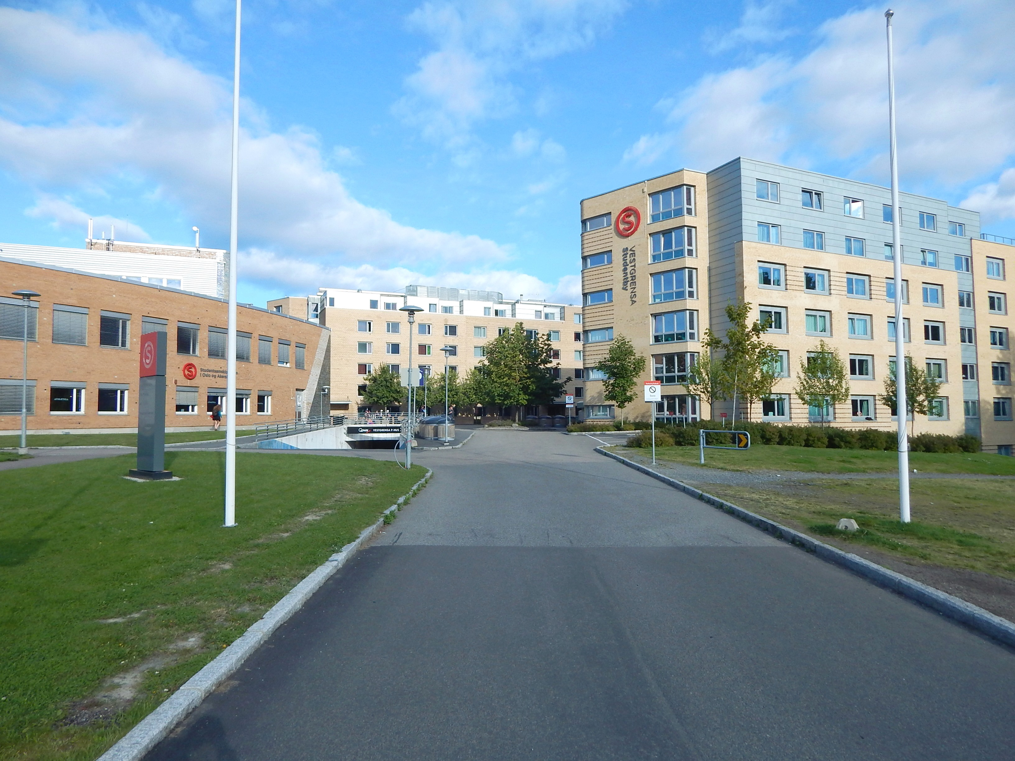 Trimveien i retning Domus Athletica og Vestgrensa studentby